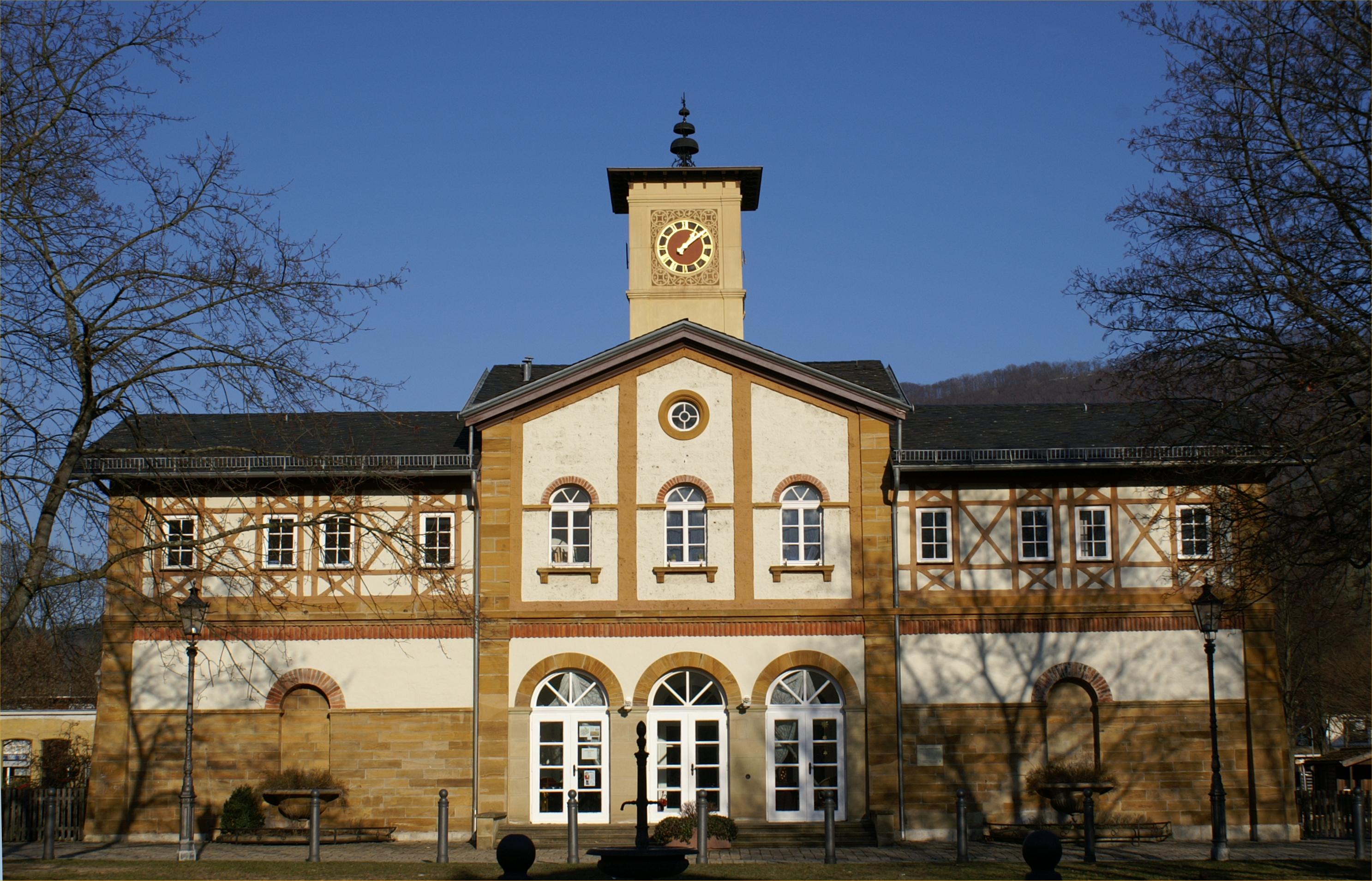 Das ehemalige Bad- und Waschhaus in der Historischen Arbeitersiedlung Kuchen